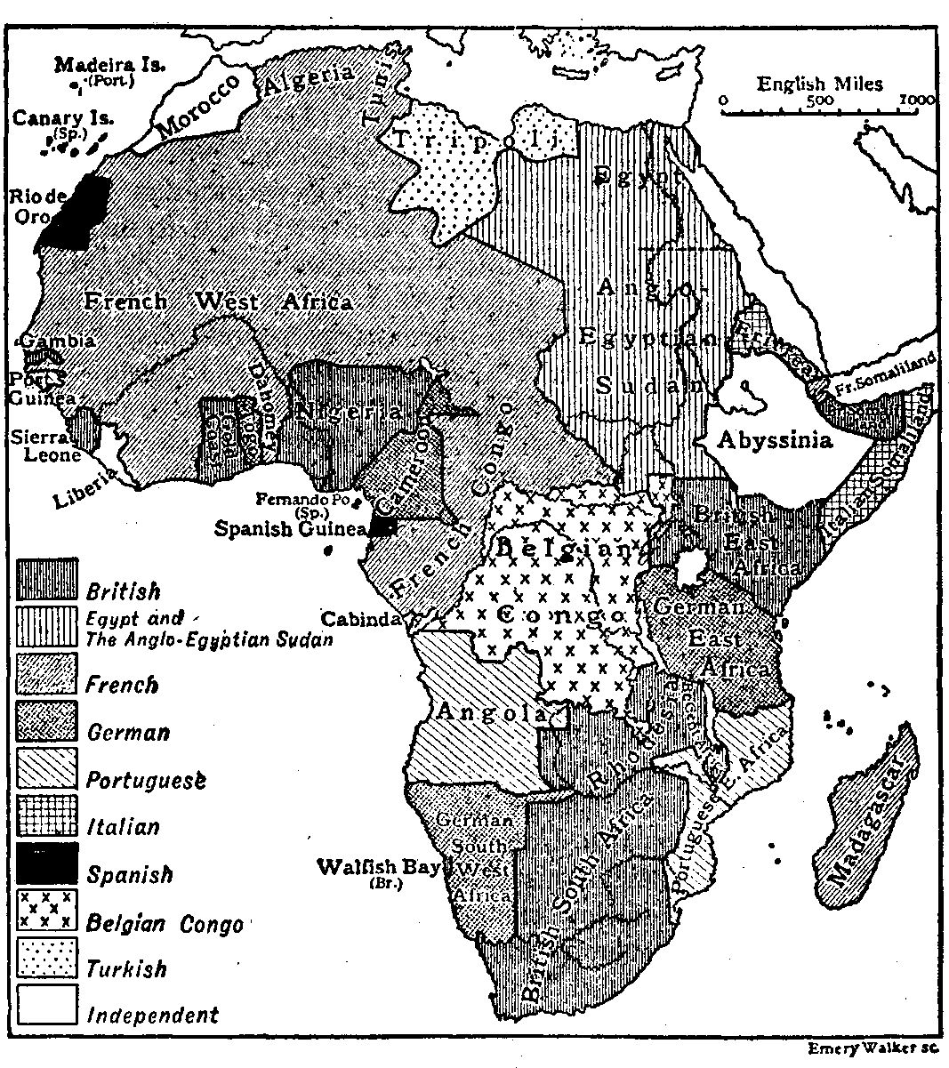 Encyclopedia Britannica 1911